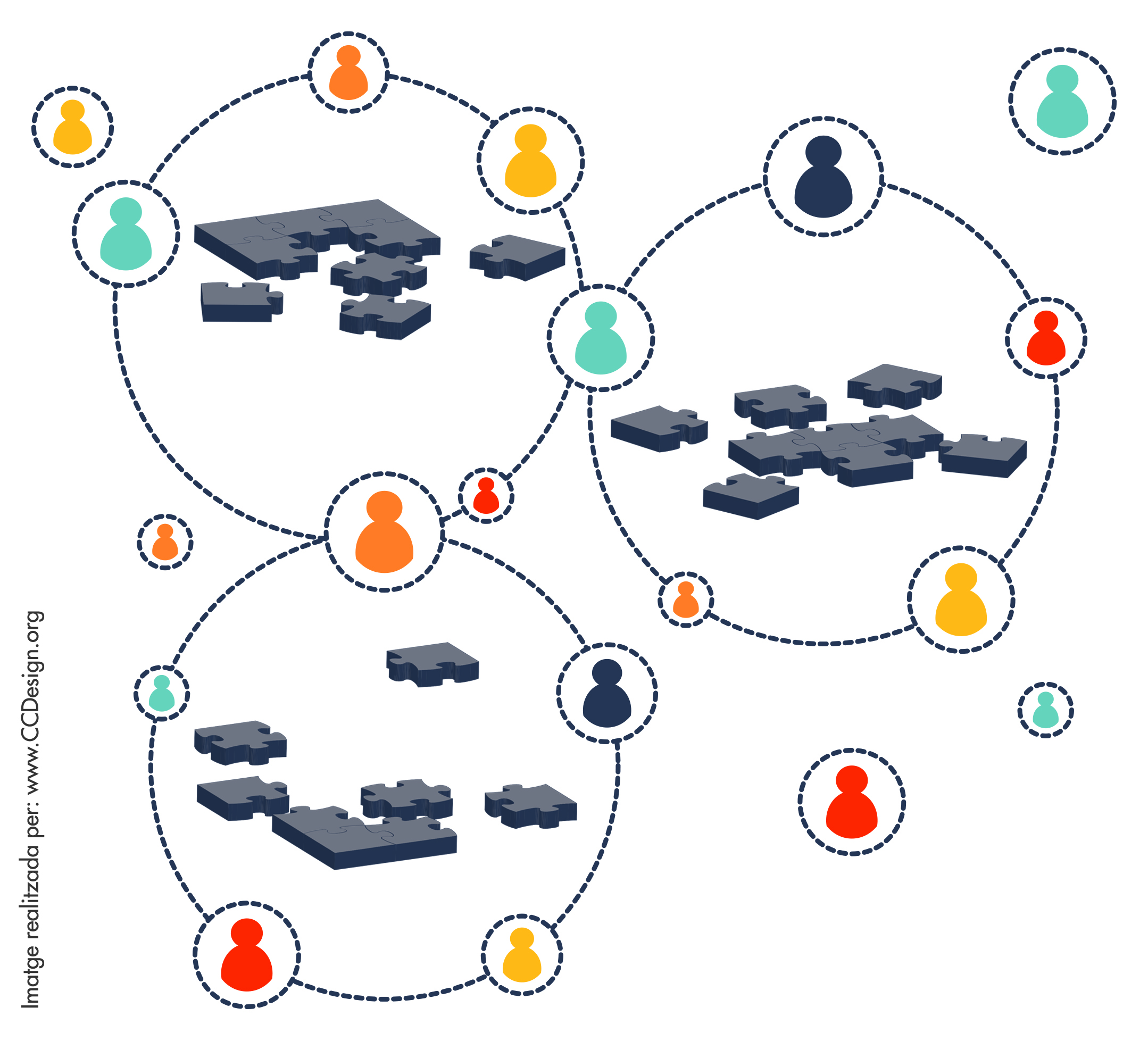 Descripció del concepte normalitat sociològica, els cercles grans compostos de cercles petits amb una icona de persona simbolitzaria un grup social que es regeix per unes normes que construeixen conjuntament simbolitzades amb el puzle. Els cercles amb solts amb la icona d'una persona dins seran els desviats que no segueixen les normes preestablertes.